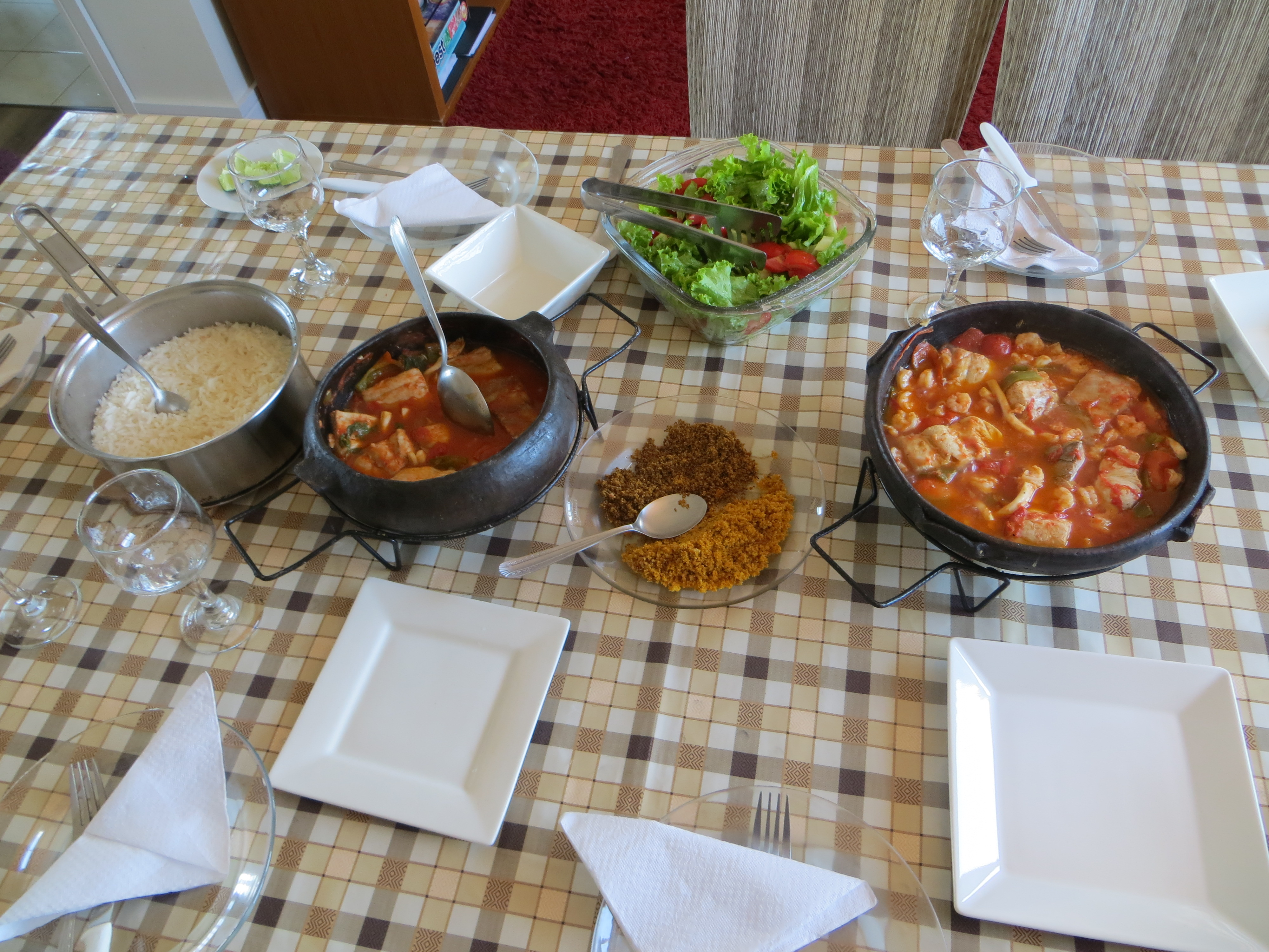 Moqueca capixaba, prato típico do estado brasileiro do Espírito Santo.